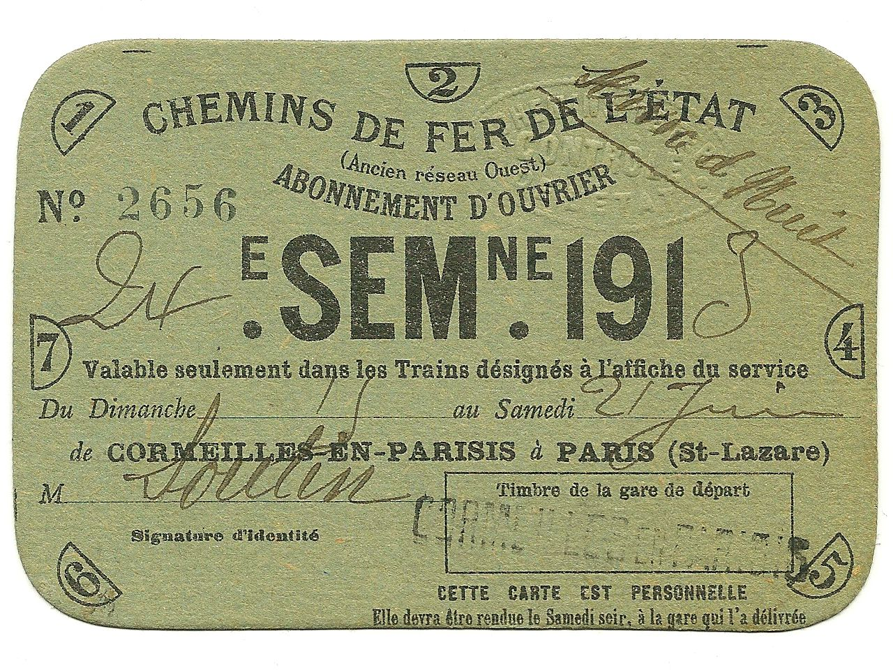 Carte d'abonnement hebdomadaire d'ouvrier, des Chemins de Fer de l'État.